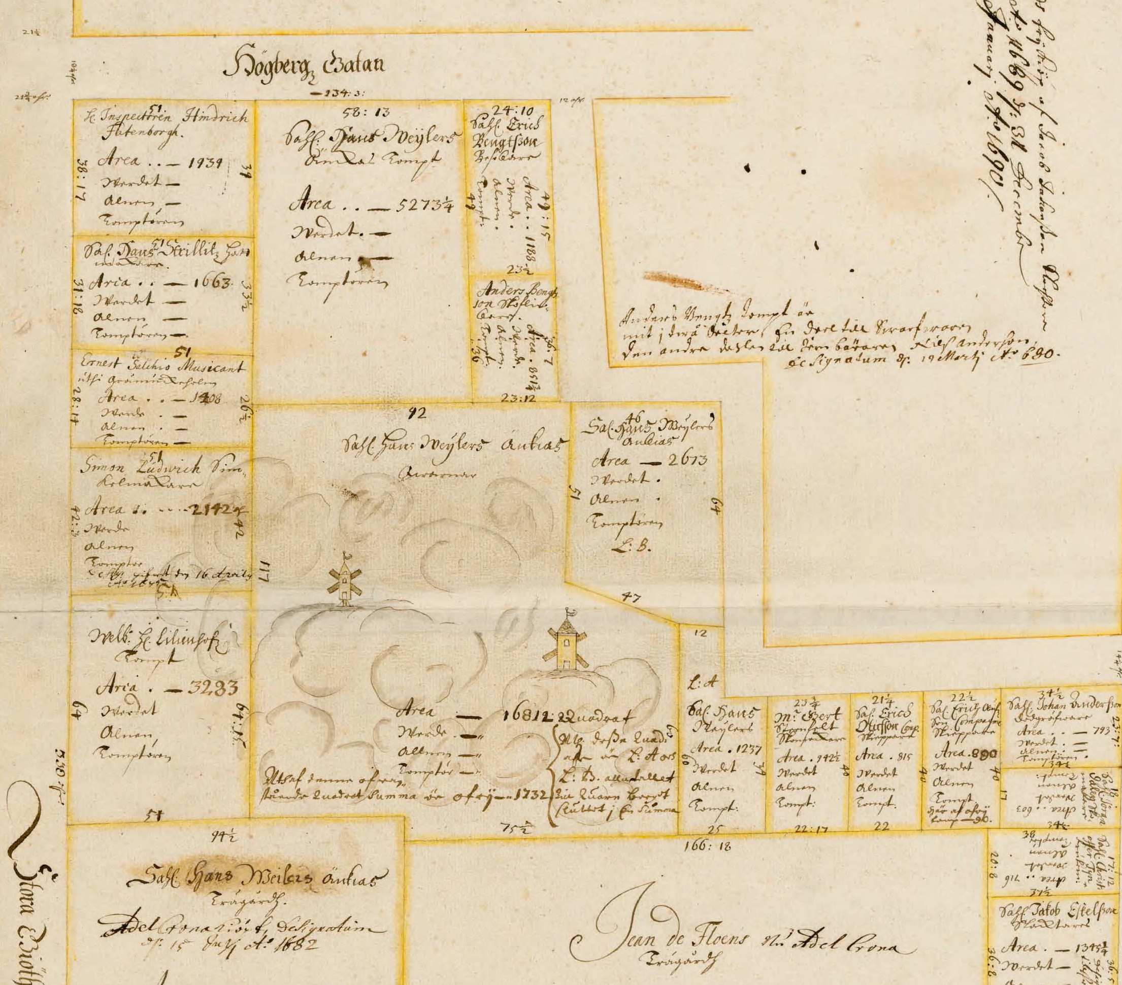 Kvarnarna Finskan och Dundercrantz enligt Holms tomtbok 1674